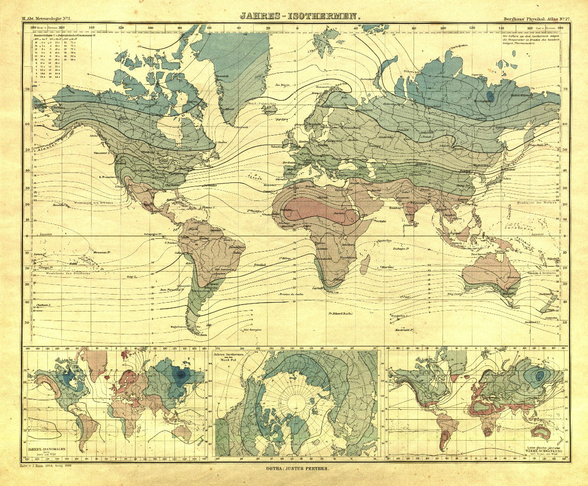 Atlas der Meteorologie, Gotha: Justus Perthes, 12 S., 12 Karten (pdf 11.3 MB) - No. I Jahres-Isothermen